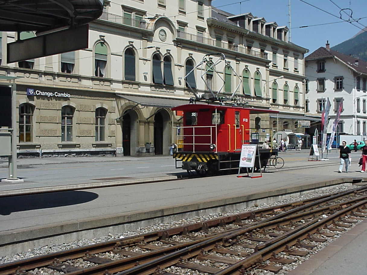 Rangierlok auf dem Bahnhofplatz von Brig